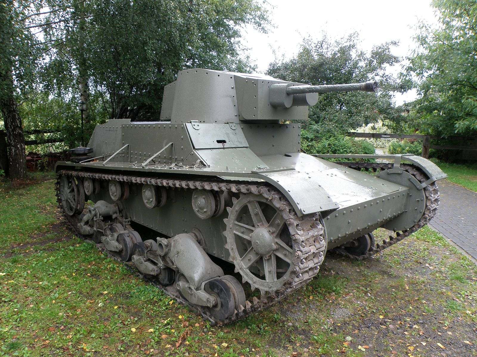 Zrekonstruowany polski czołg 7TP w czasie rekonstrukcji bitwa pod Łomiankami w 2011